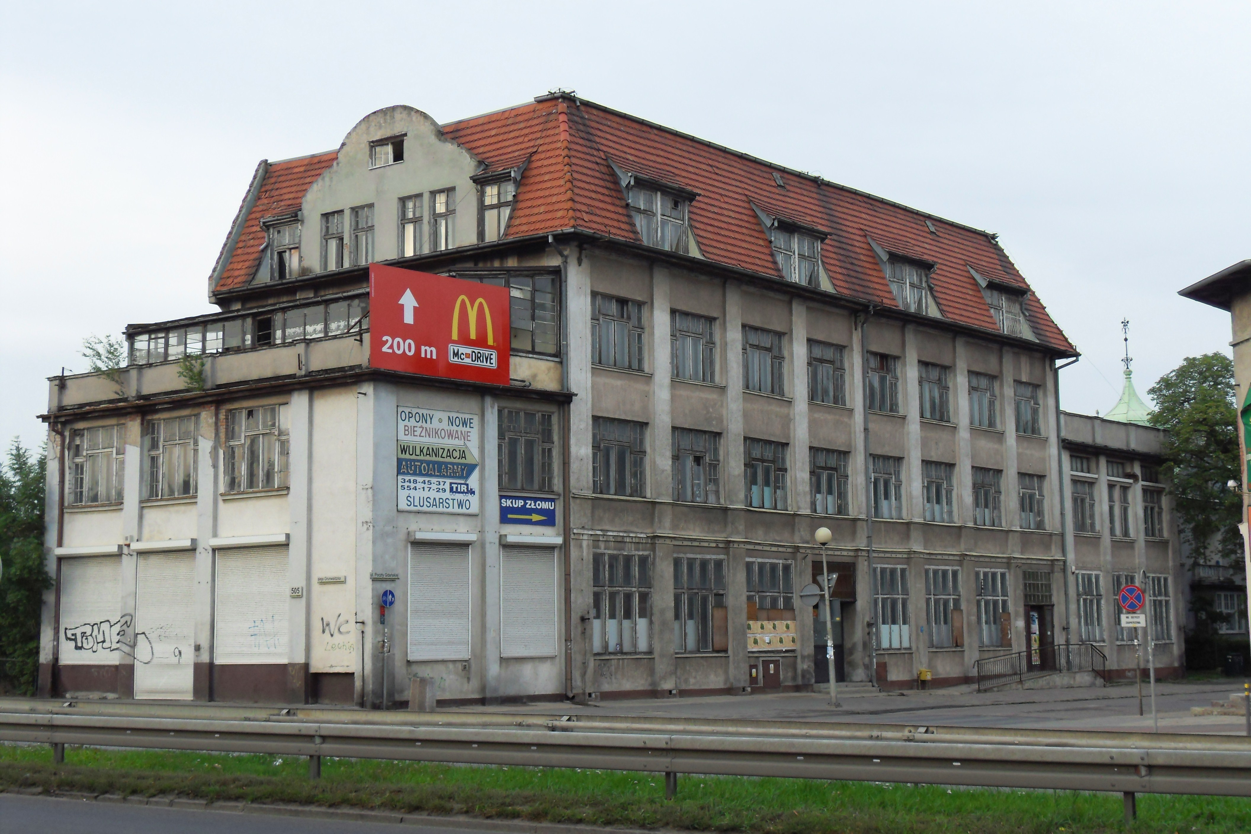 Gdańsk Oliwa. Dawny hotel "Deutscher Hof", po II wojnie światowej przychodnia. Ul. Grunwaldzka 505.